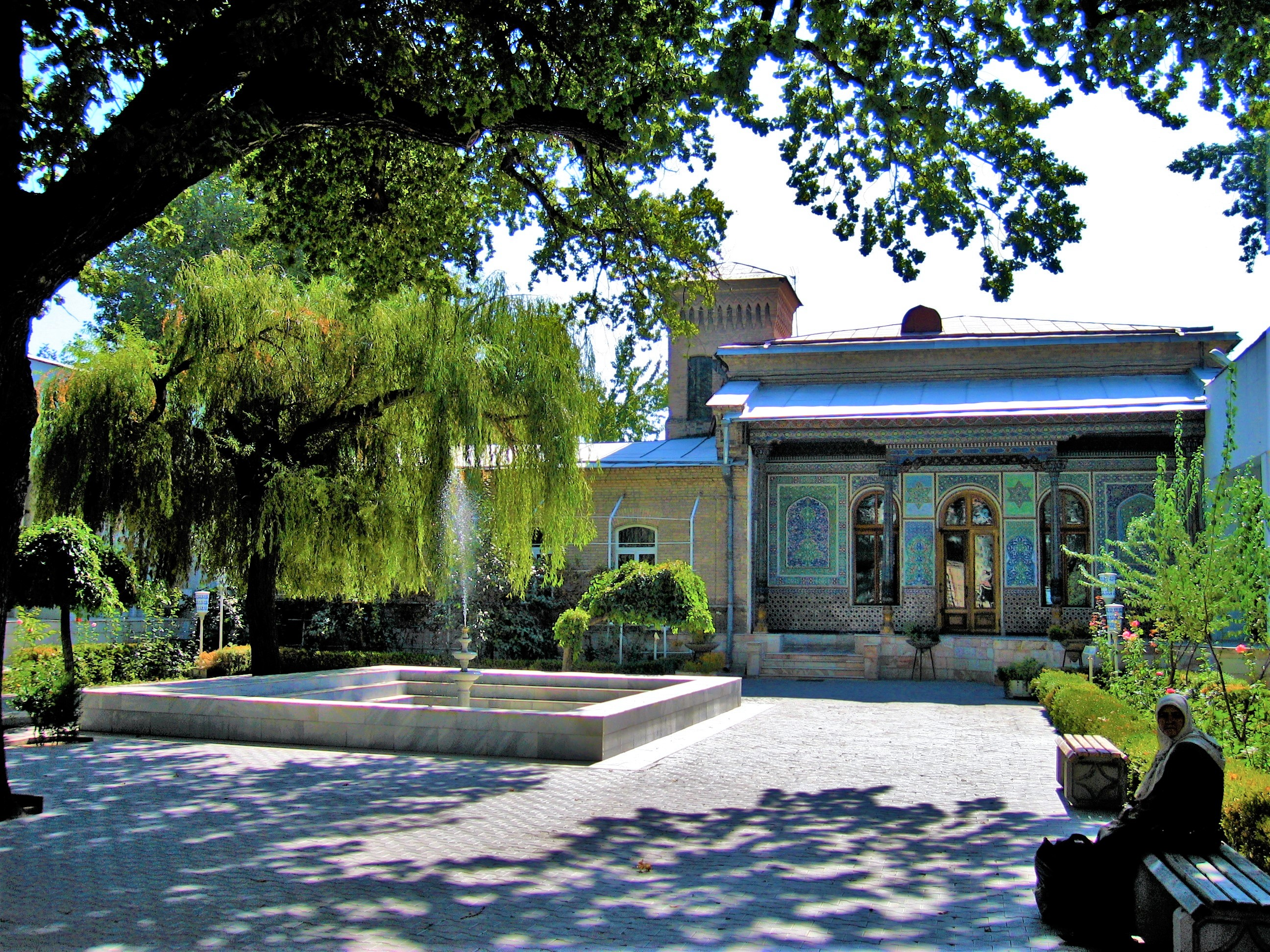 Museum of Applied Arts in Tashkent, Uzbekistan.